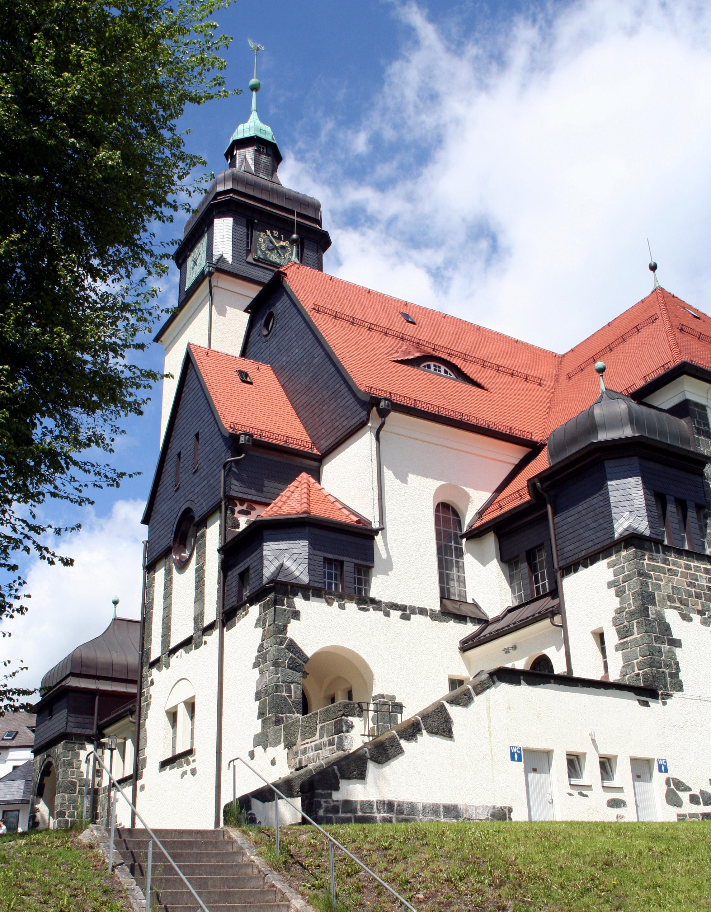 Bad Steben, Lutherkirche